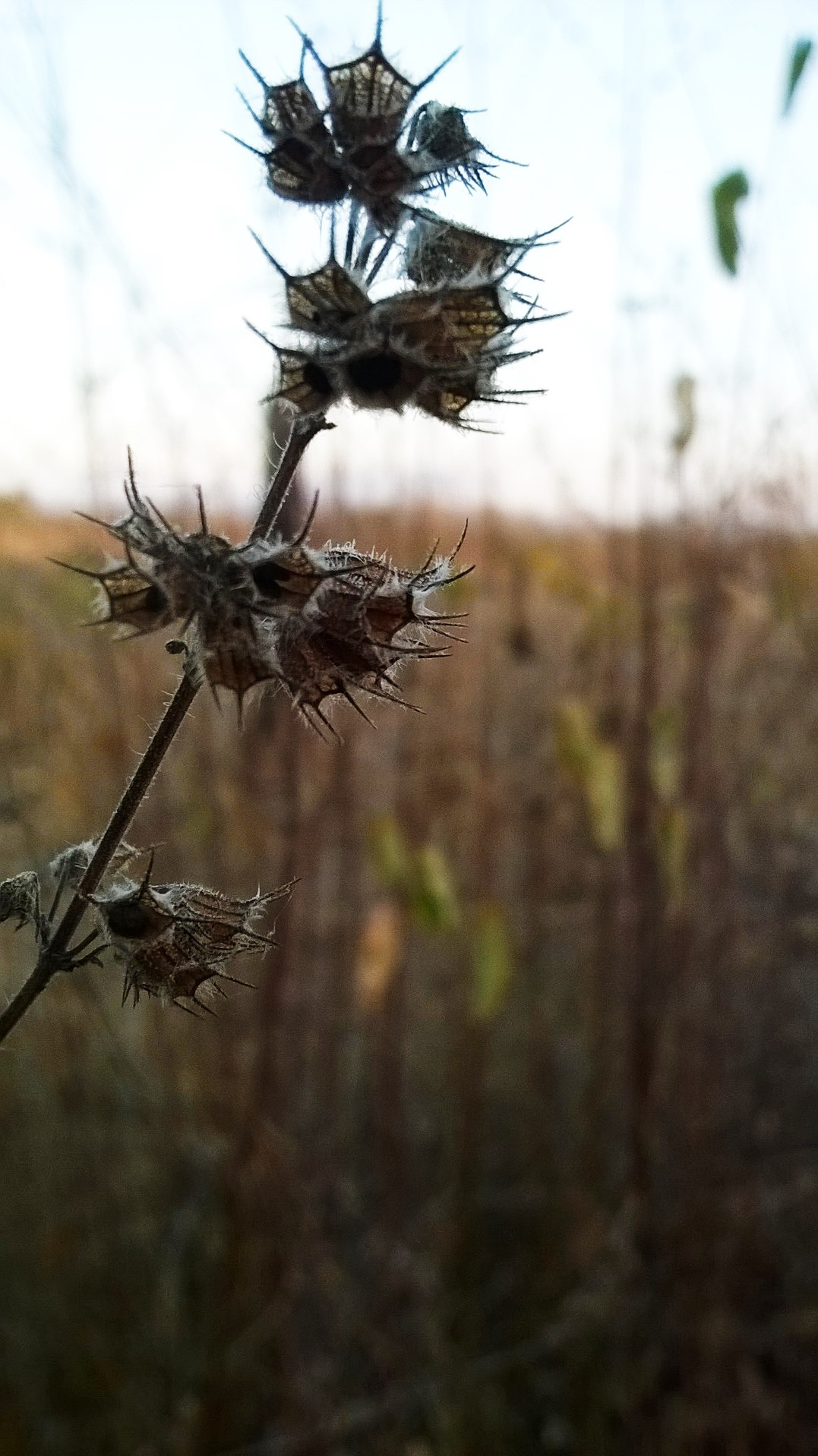 Fotografia minimalista tirada no sertão cearense que retrata um carrapixo, parte de uma planta que costuma grudar na pele e nos pêlos de animais, ajudando assim a se disseminar mais longe. Muito comum grudar nas roupas das pessoas. A partir da observação disso foi criado o Velcro